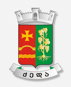 ქედის მუნიციპალიტეტის გერბი